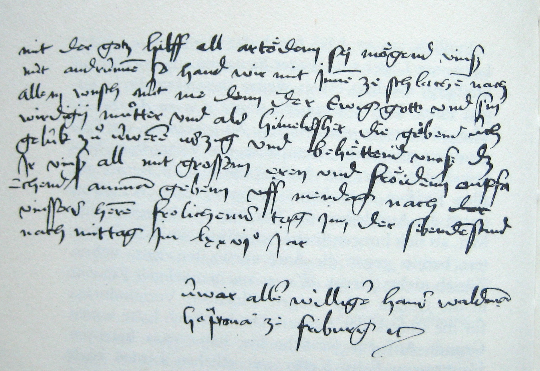 Brief von Bürgermeister Hans Waldmann an den Zürcher Rat, 17. Juni 1476